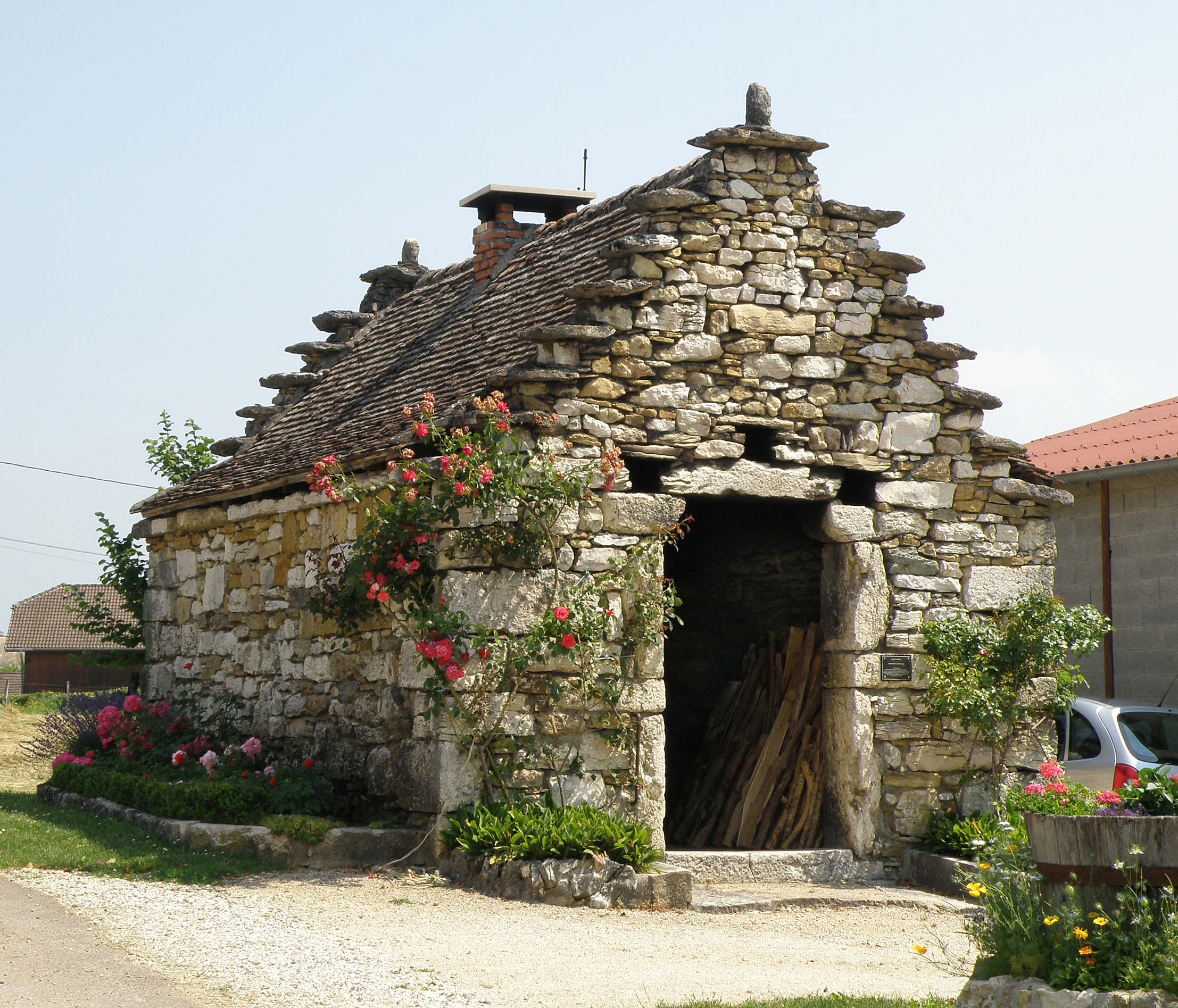 Parves, comm. du département de l’Ain (région Rhône-Alpes, France). Four banal sis route du Chenay, dans le hameau de Sorbier (dans la partie est de la commune). La plaque à droite de l'entrée porte l'inscription suivante : Four banal du XVIIIe siècle. À l'initiative de l'association parvéranne « les Amis du Bugey », et sur un terrain offert par monsieur Marcel Grobon, ce four a été démoli et reconstruit à l'identique, en 1975, par les habitants de Parves, avec le concours des Bâtiments de France.